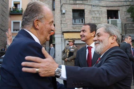 Toledo (Espanha) - Presidente Lula cumprimenta o Rei Juan Carlos. Ao fundo o presidente espanhol, José Luis Zapatero. 13 de Outubro de 2008 Toledo (Espanha)